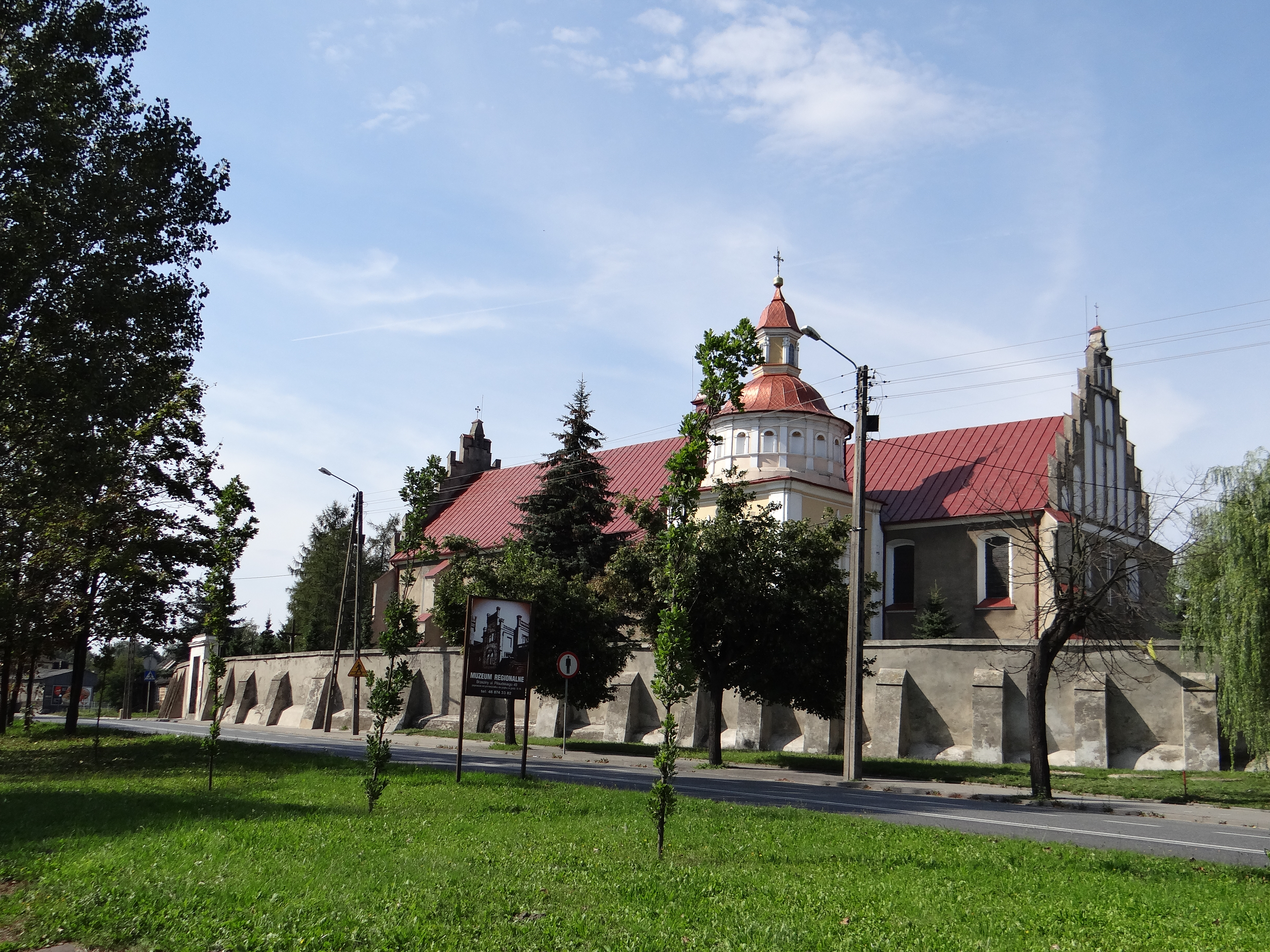 Kościół p.w. Podwyższenia Świętego Krzyża w Brzezinach